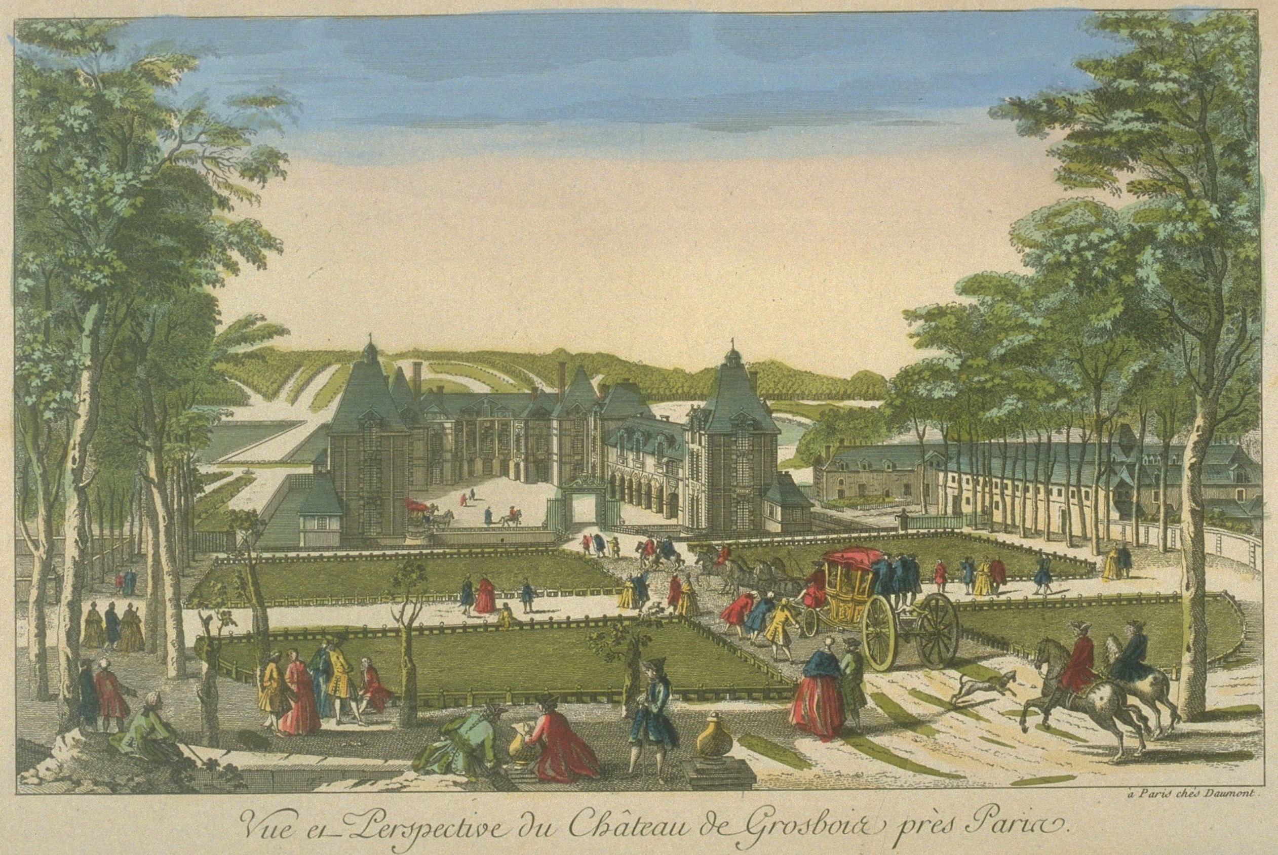 Kolorierte Zeichnung des Schlosses Grobois